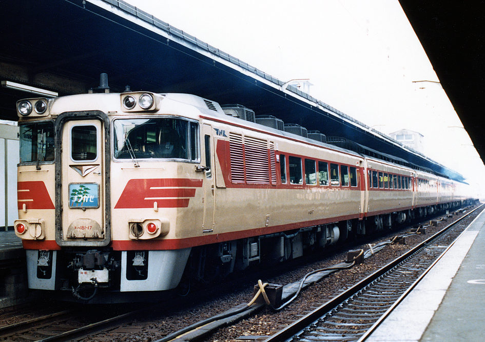 国鉄 キハ181系特急形気動車 特急「まつかぜ1号」